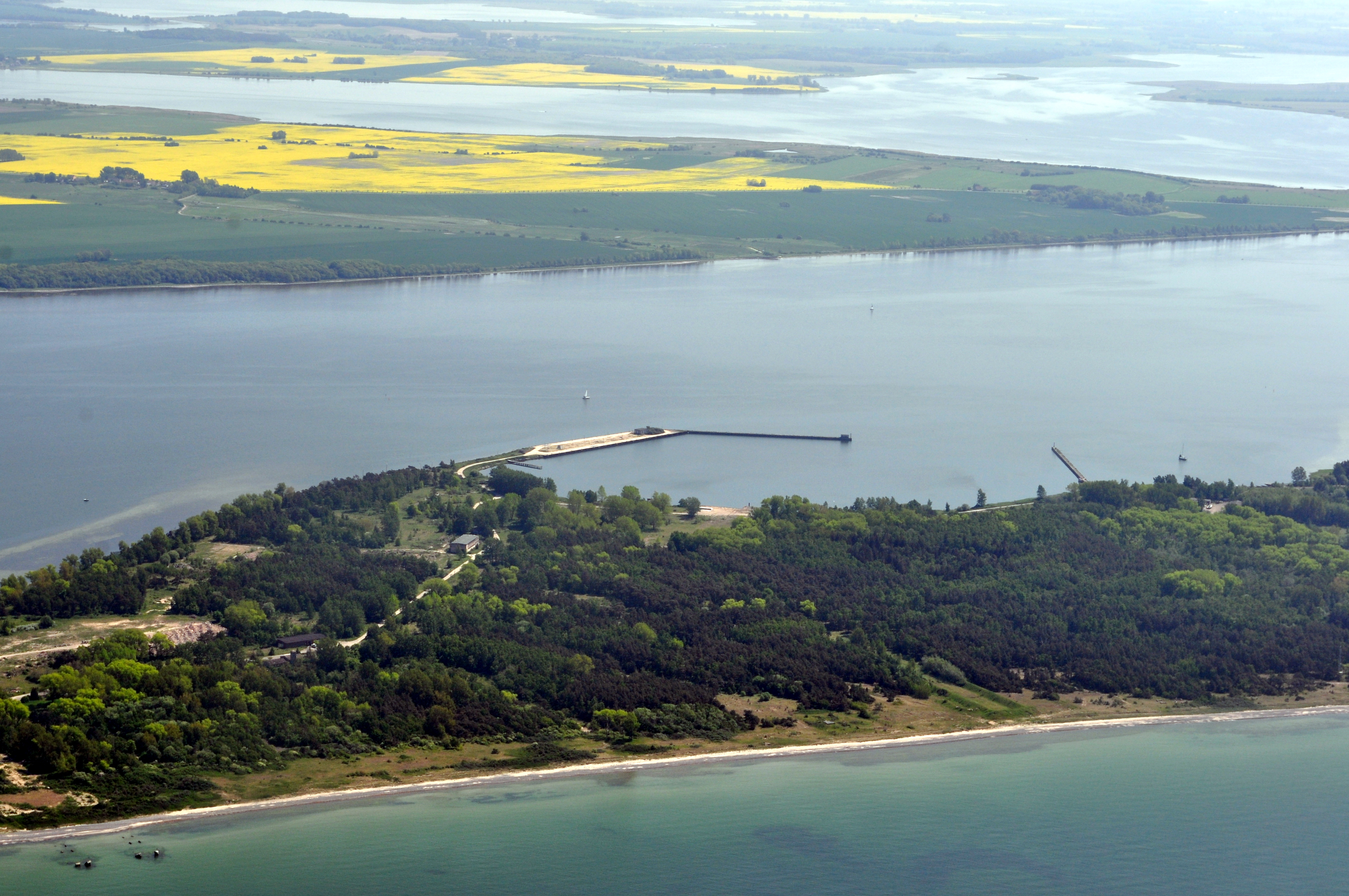 Die Bilder wurden von mir während eines einstündigen Rundflugs ab Flugplatz Güttin am 21. Mai 2011 aufgenommen. Die Bildbeschreibung steht im Dateinamen. Aufgenommen mit einer Nikon D5000 durch das Seitenfenster des Flugzeugs.